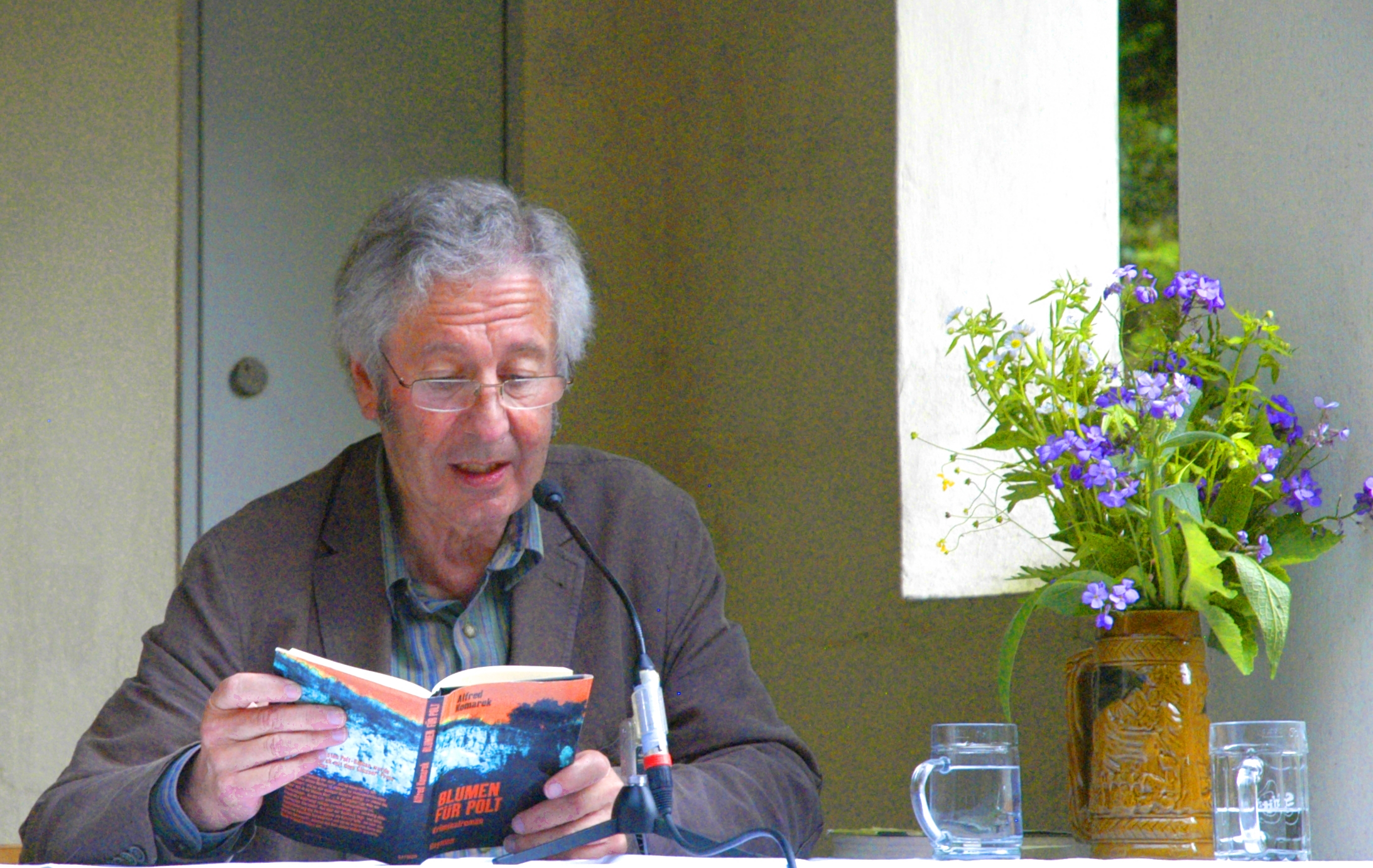 Alfred Komarek bei der Eröffnung des Weinviertelfestivals 2013 am 14. Juni 2013 in der Mühlbergkellergasse in Sitzendorf an der Schmida